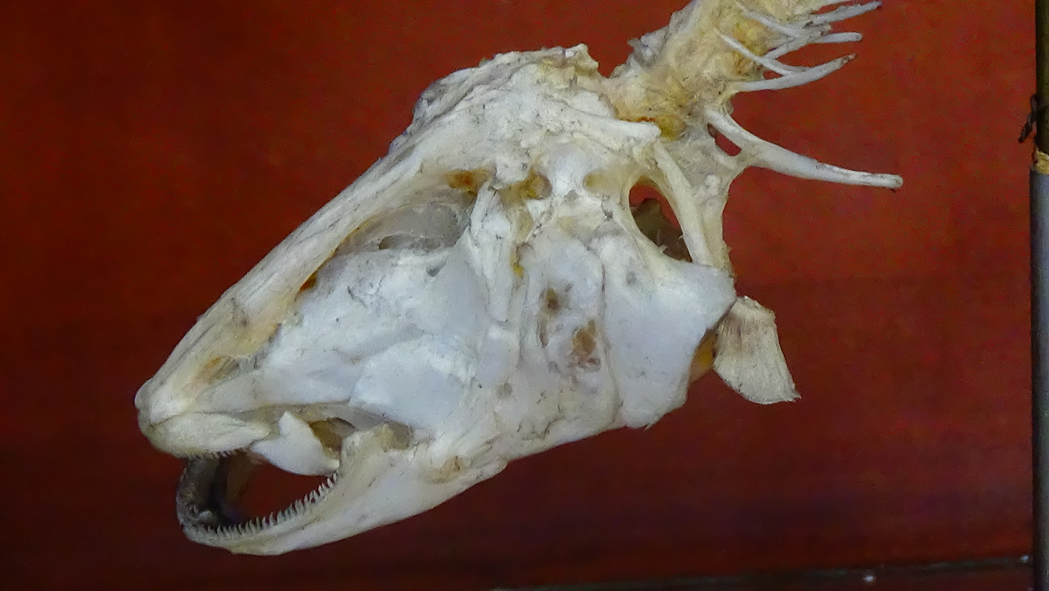 Anguille électrique - Electrophorus electricus - tete squelette MNHN